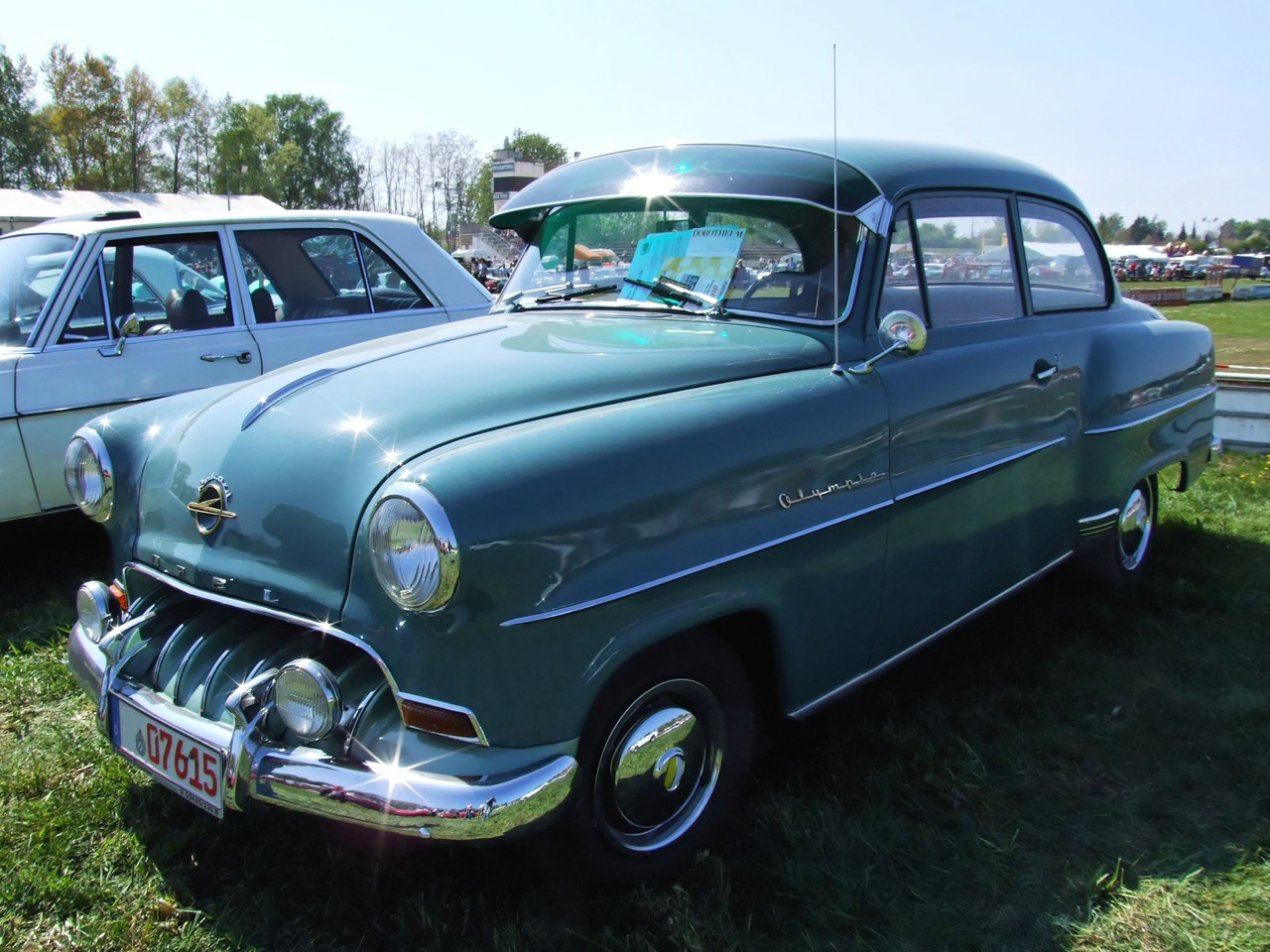 Quelle: selbst fotografiert, 04/2007 Fotograf: Späth Chr.